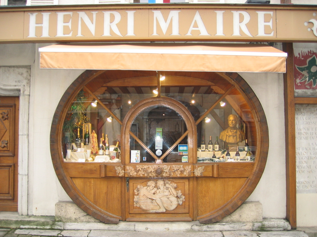 Arbois - Jura - France